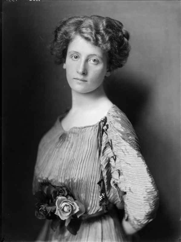 Sidonie Nádherná z Borutína (1885–1950), fotografie z roku 1910.